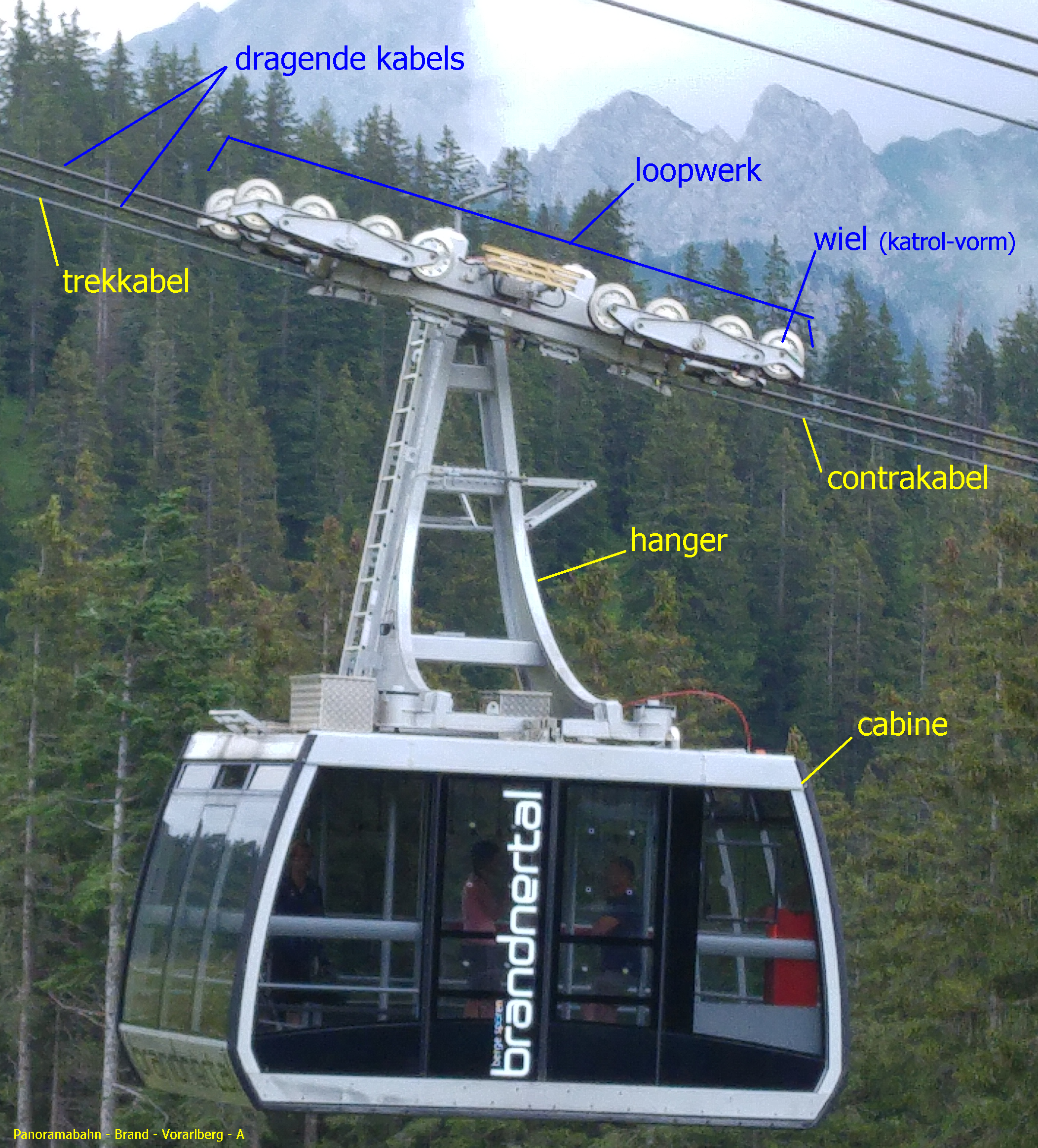 Kabelbaan: Panoramabahn Brand, Brandnertal, Vorarlberg. Met aanduiding onderdelen